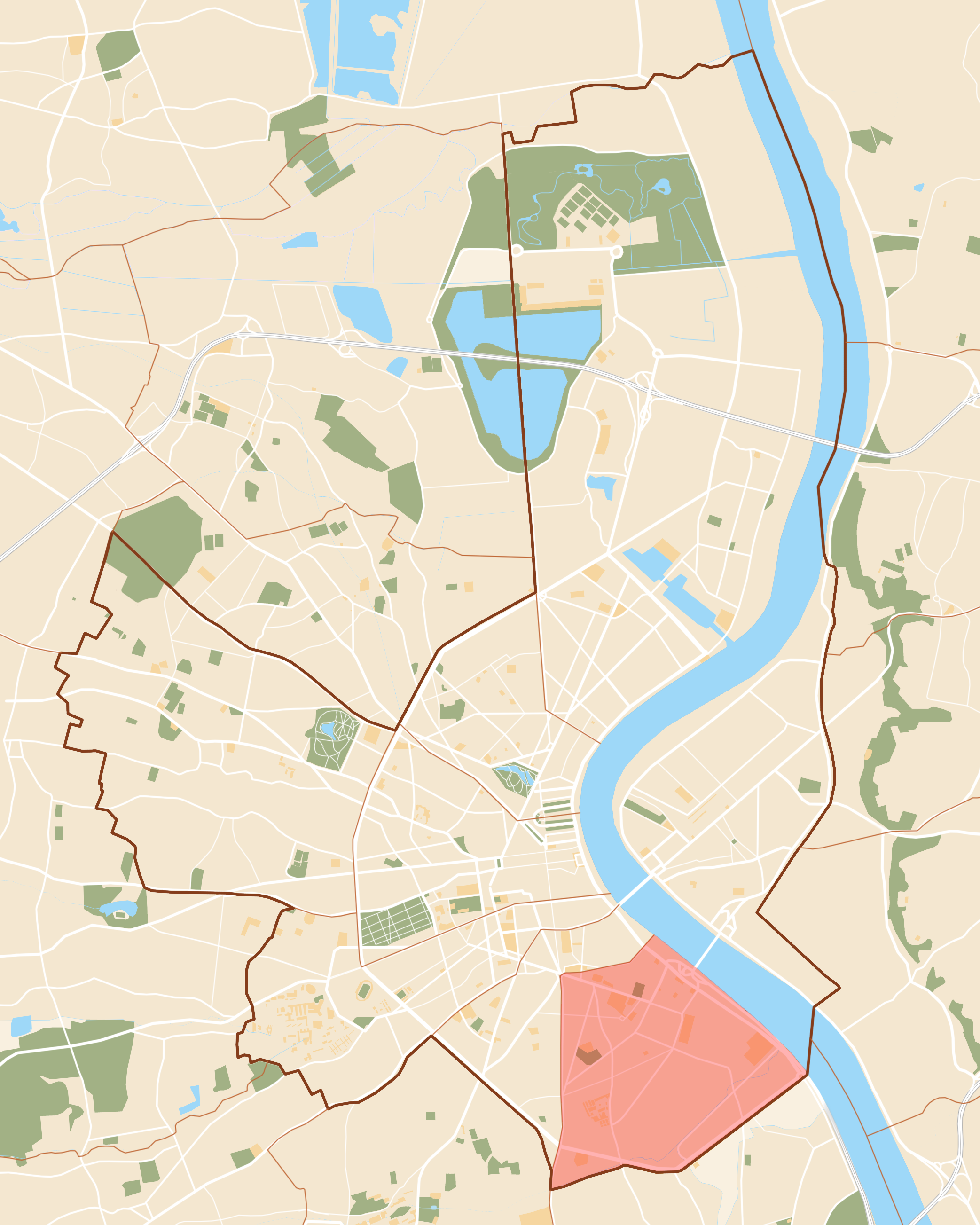 Plan de Bordeaux avec le Canton 6.